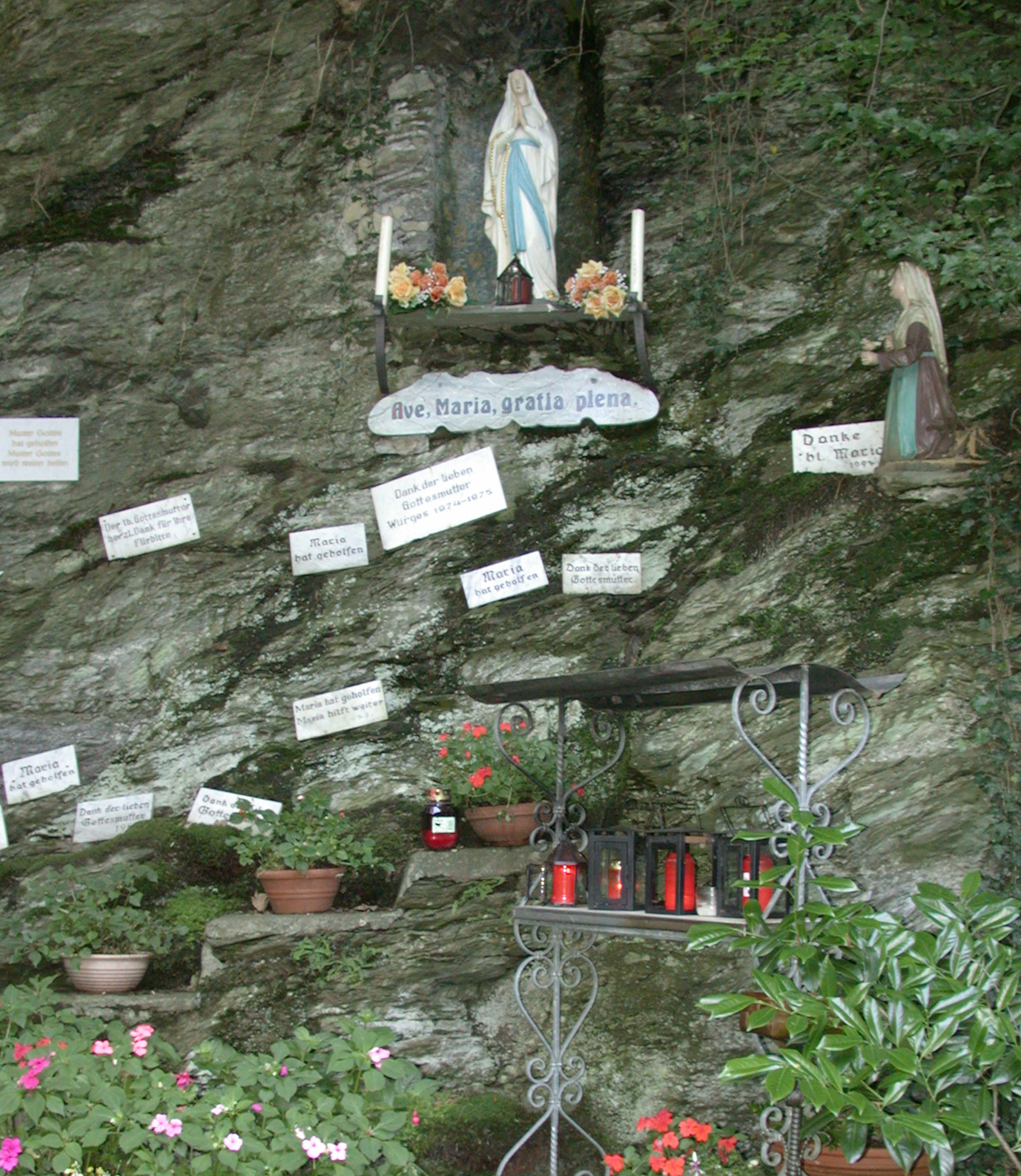 Mariengrotte Schwickershausen, Bad Camberg, Deutschland